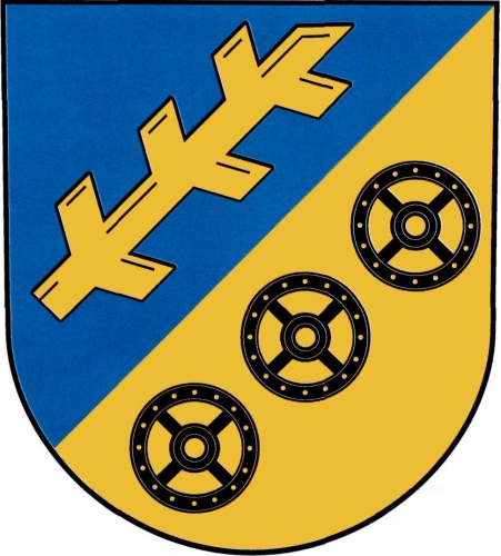 znak obce Strašice